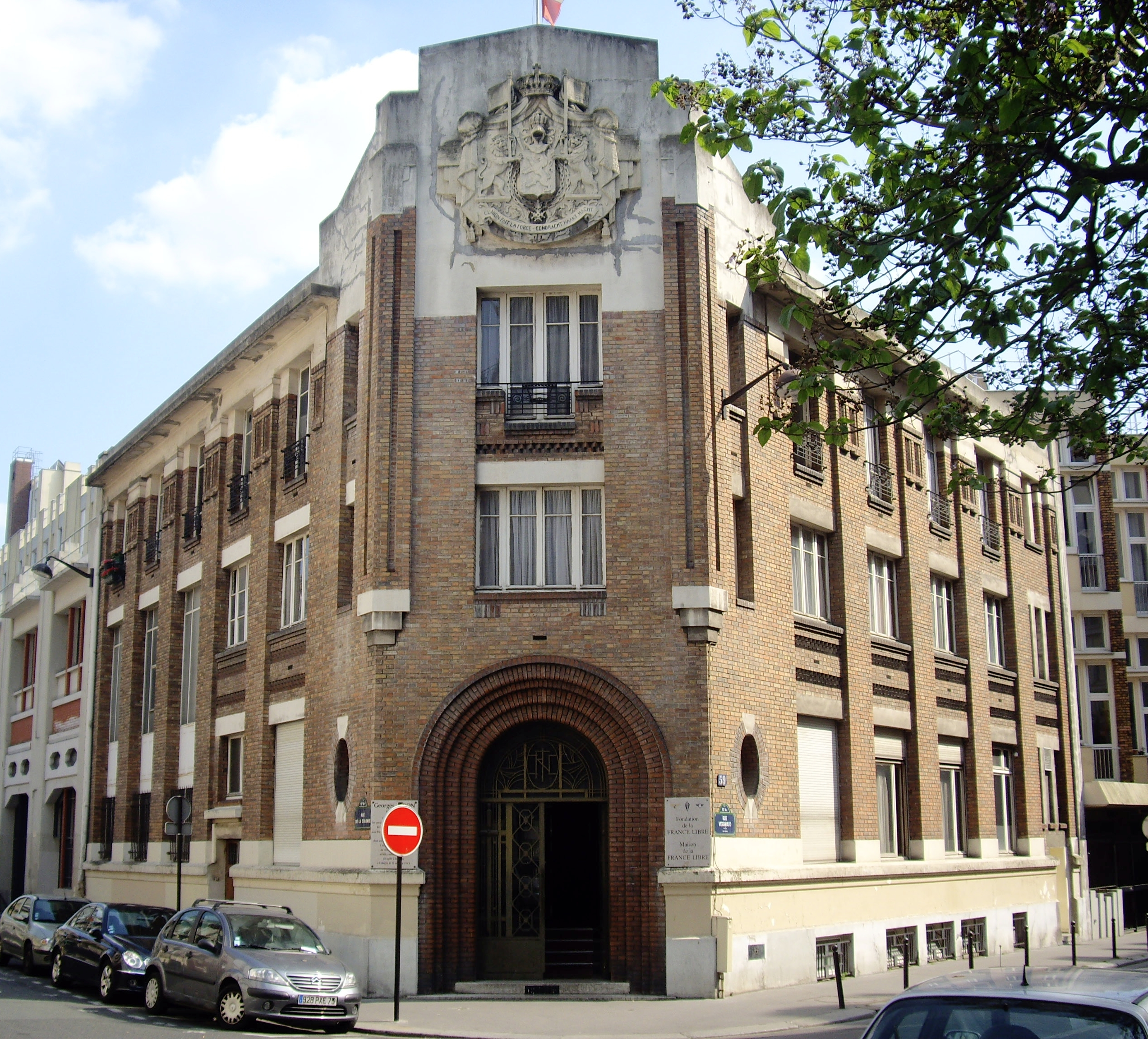 Siège de la Fondation de la France Libre, 59 rue Vergniaud, Paris 13e, à l'angle de la rue de la Colonie.